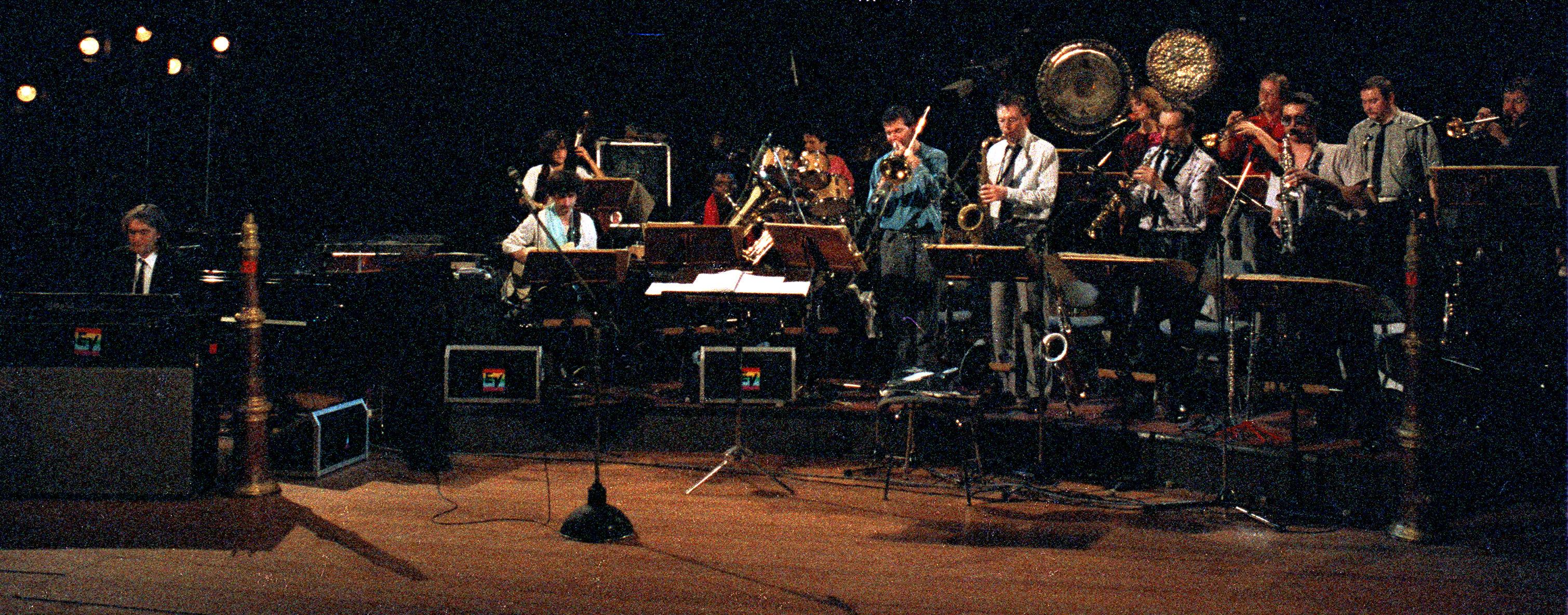 Vienna Art Orchestra beim 201. NDR Jazzworkshop in Hamburg